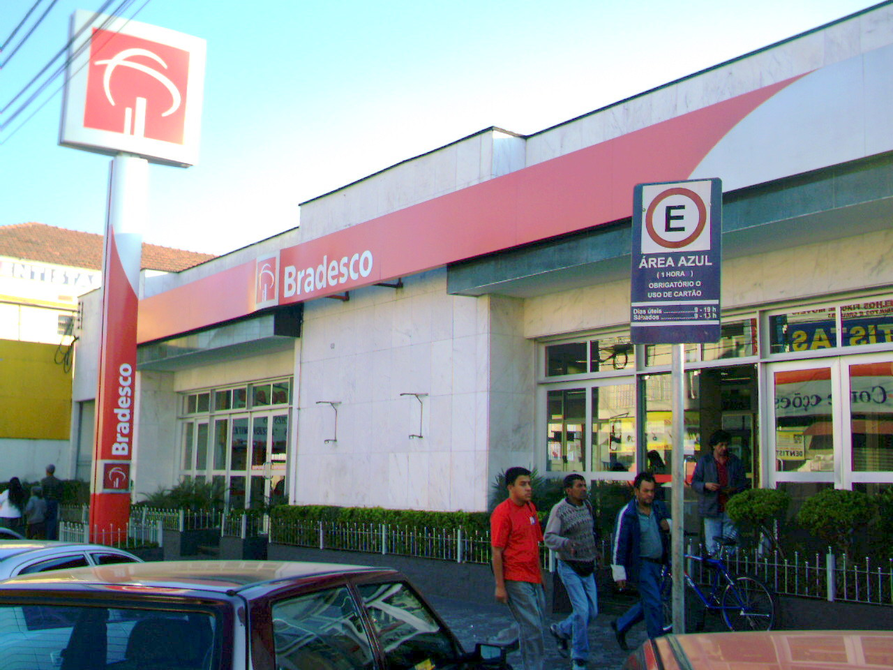 Bradesco, agência Poá